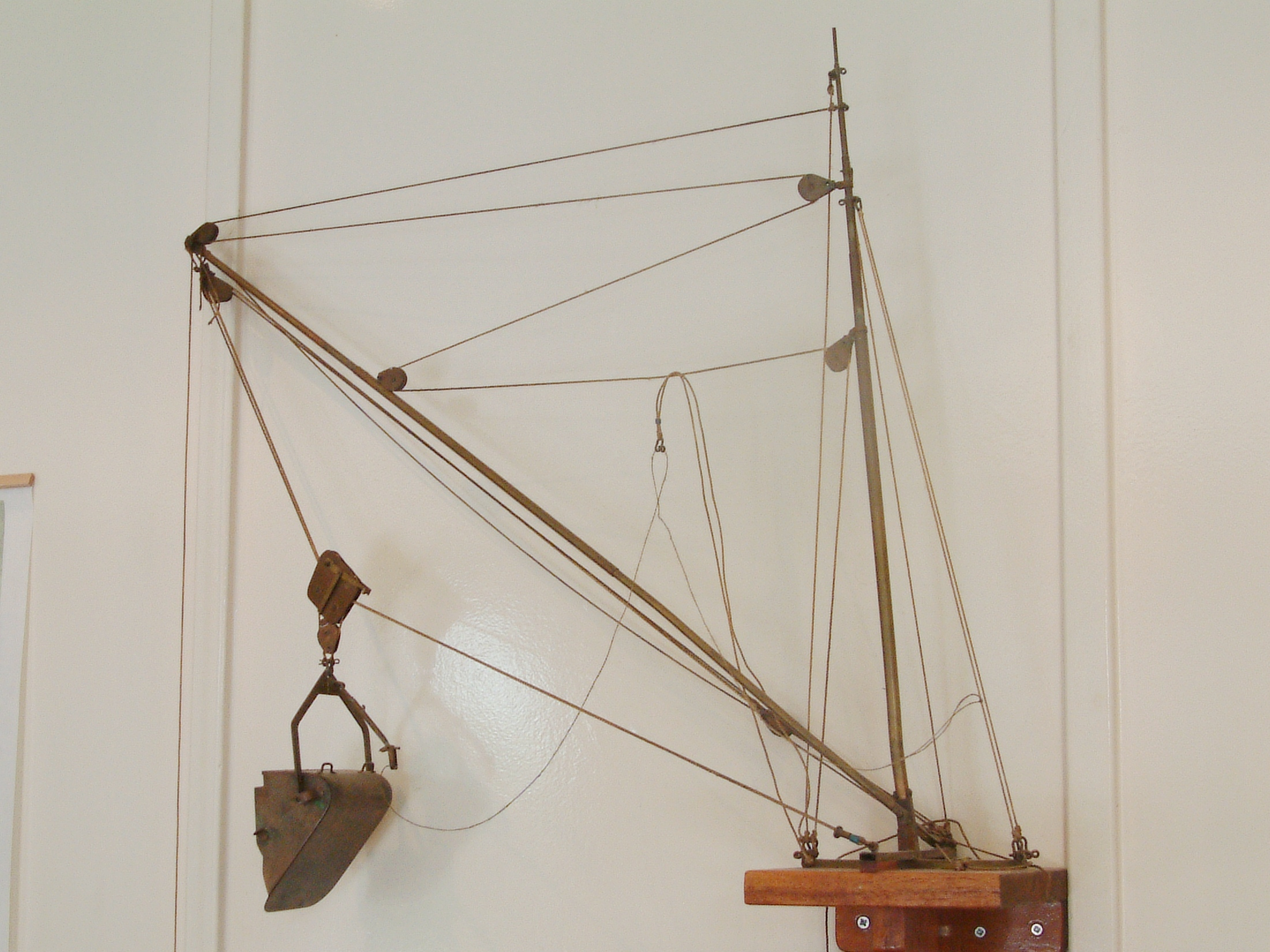 Zandlosinstallatie, model in het kantoor van de werf in Hasselt, Overijssel